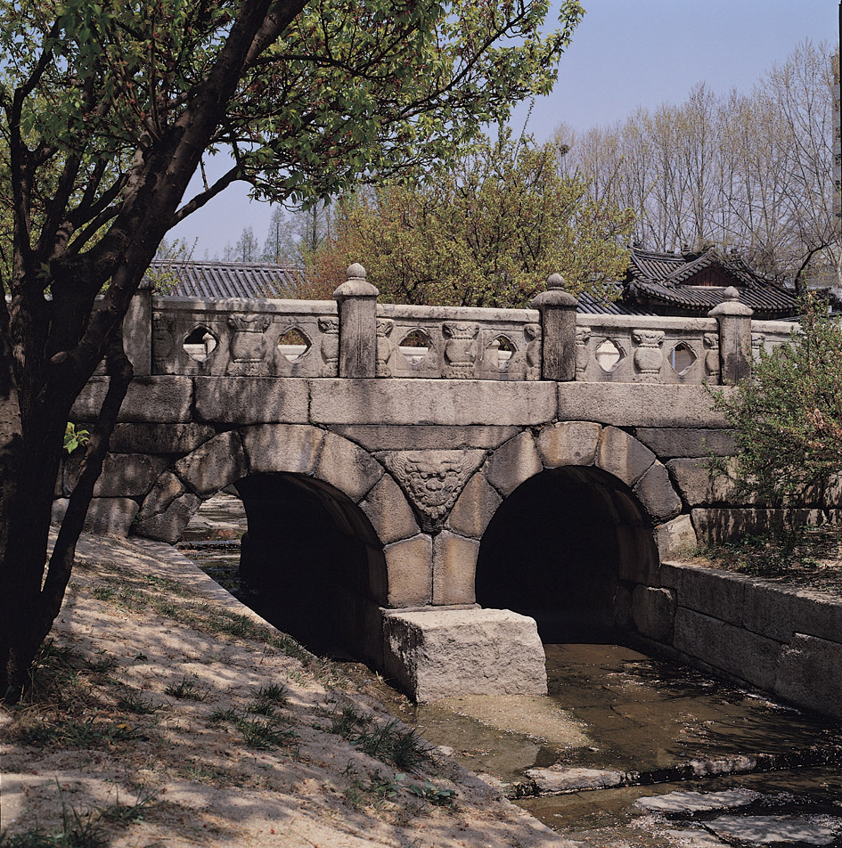 보물 제386호 창경궁 옥천교 (昌慶宮 玉川橋) - 2칸의 반원형 무지개다리가 조화로운 옥천교